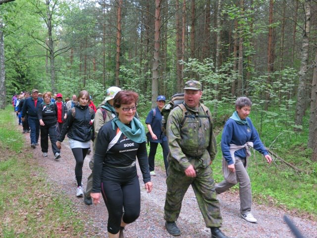 Kesäyön marssi 2012 Santahaminassa, kuva Pekka Tuunanen